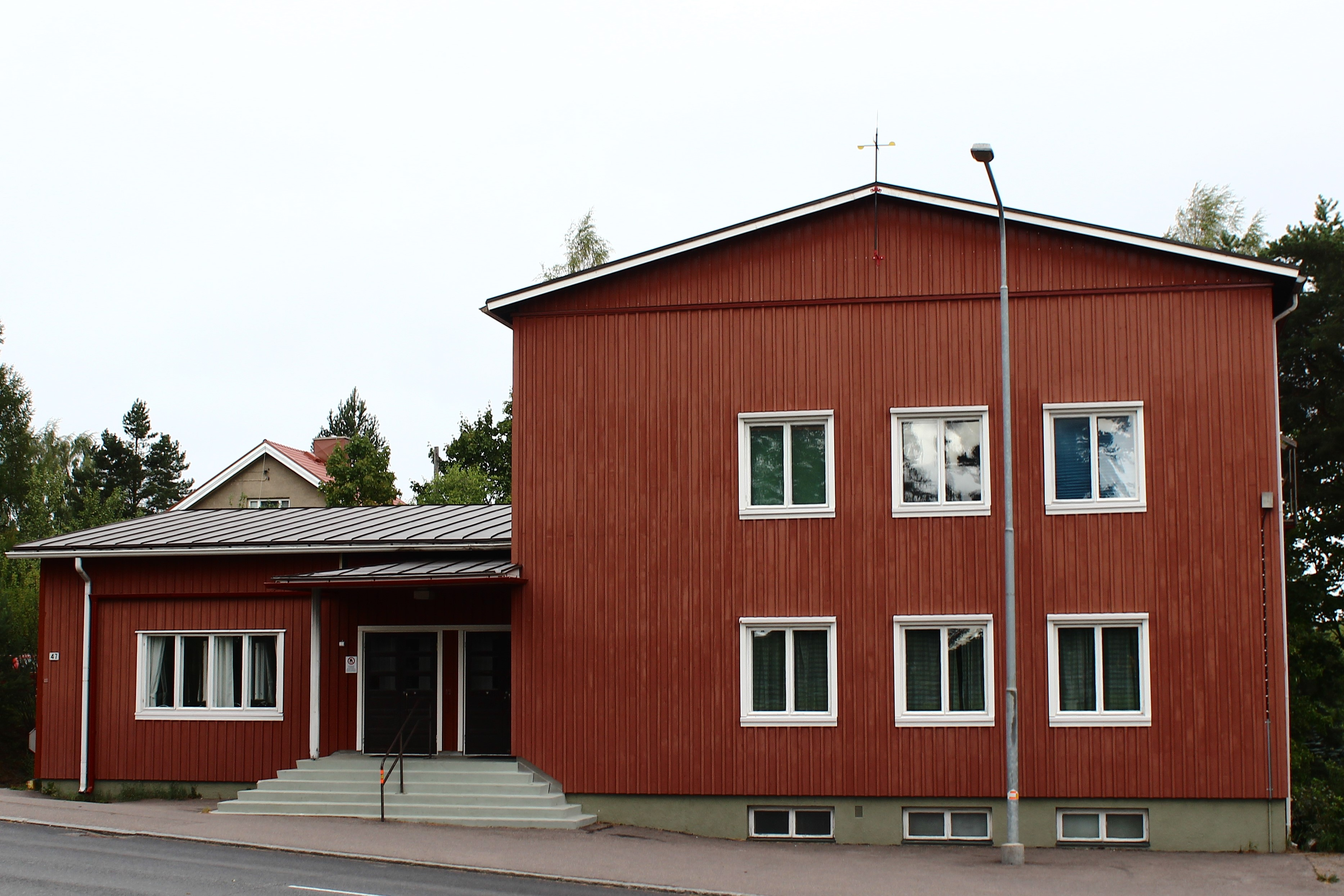 Messukylän työväntalon julkisivu